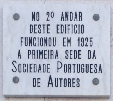 Portugal.